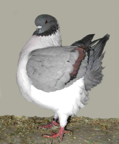 Modena, English (Silver Gazzi)